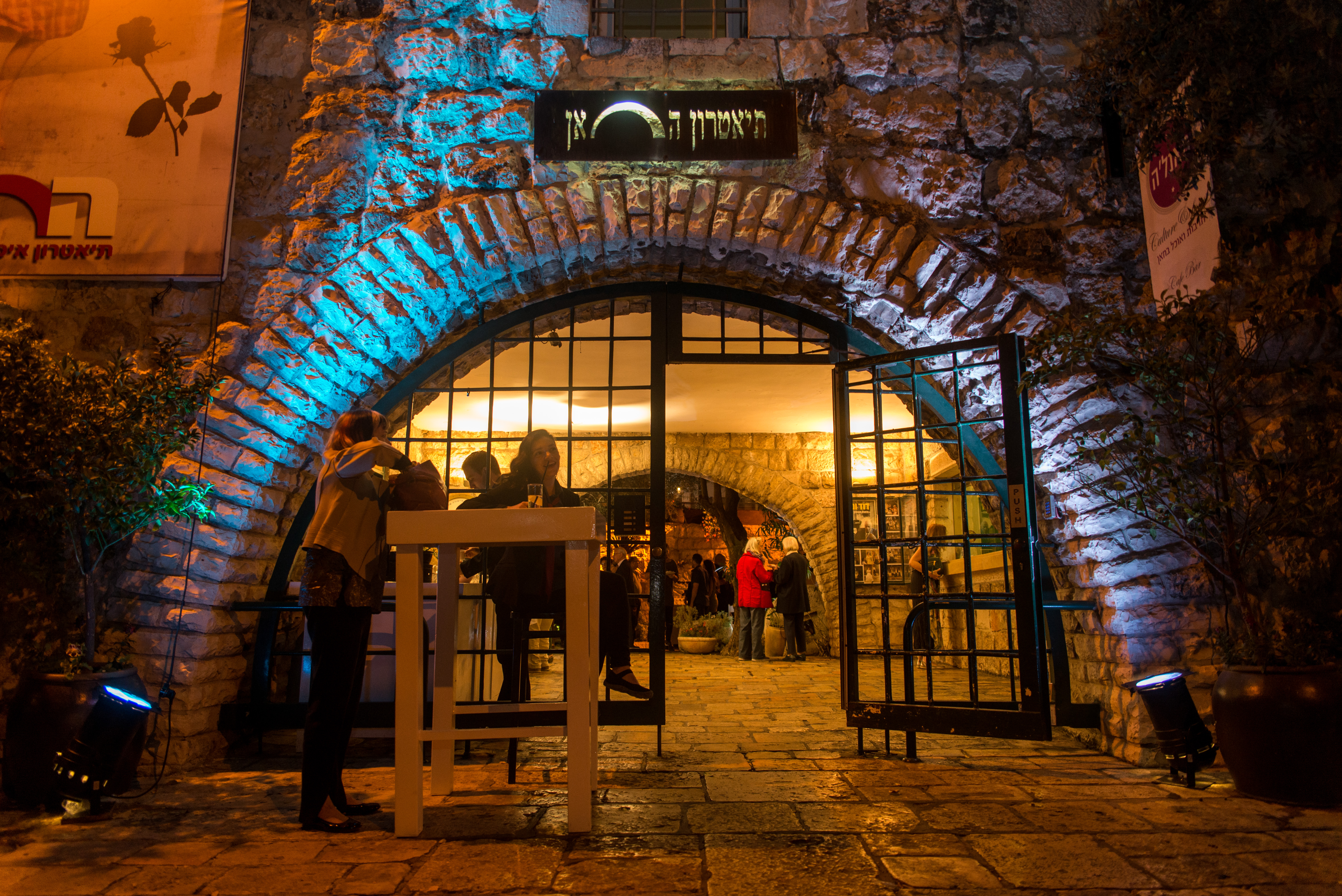 תיאטרון החאן בלילה